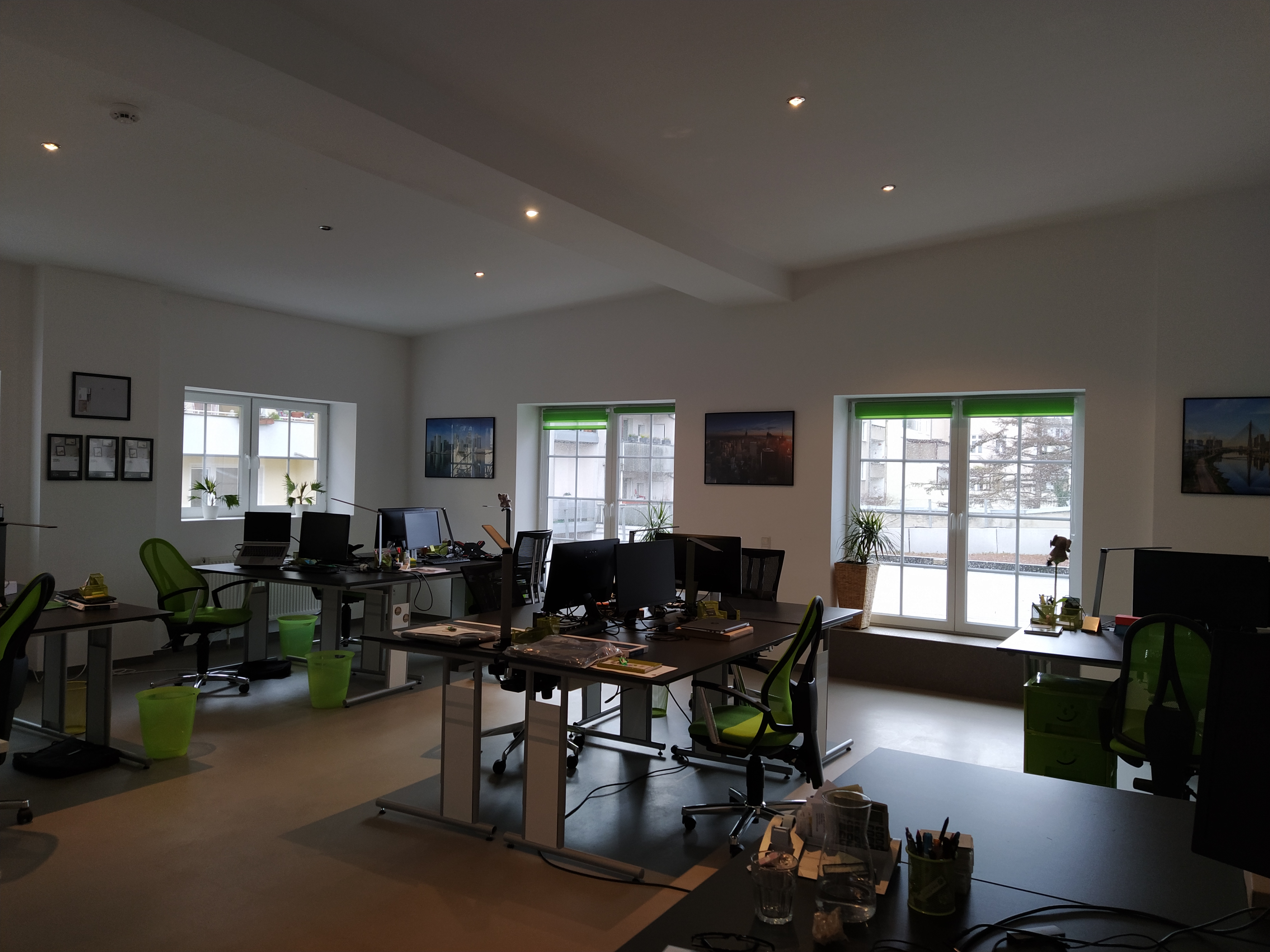 Geschäftsräume der DynAdmic Deutschland GmbH